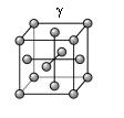 Struktura regularna ściennie centrowana (A1) austenitu